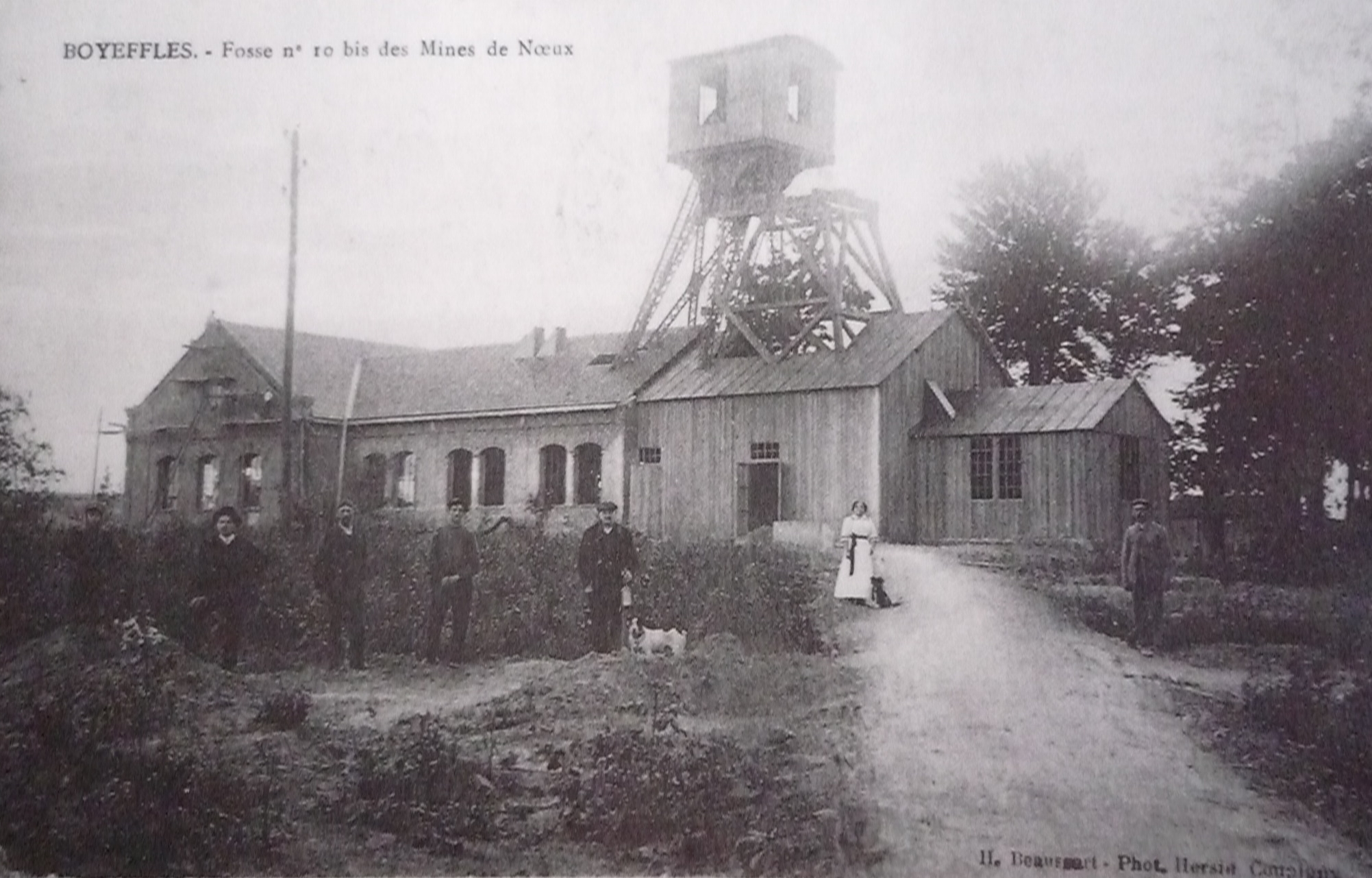 La Fosse n° 10 bis de la Compagnie des mines de Nœux était un charbonnage constitué d'un seul puits situé à Bouvigny-Boyeffles, Pas-de-Calais, Nord-Pas-de-Calais, France.